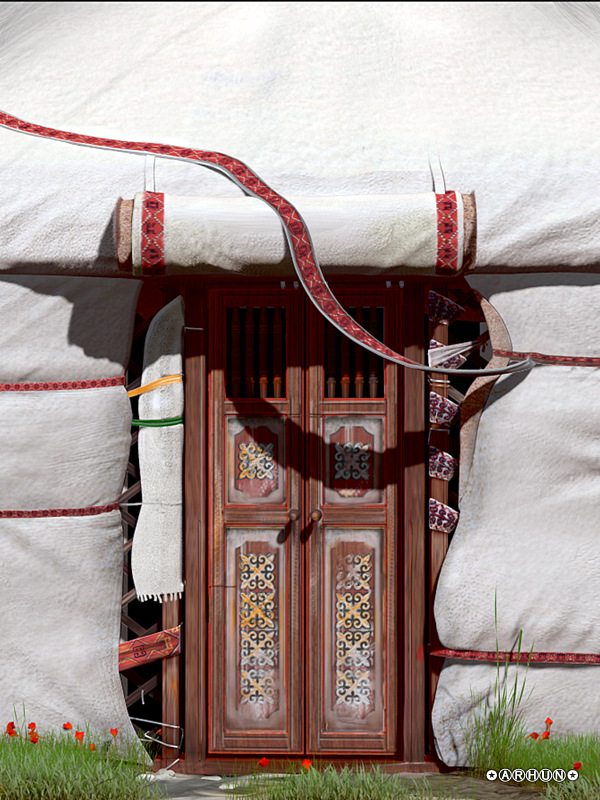 Қазақша (кирил): Сықырлауық. Есік. Немесе киіз үйдің кіреберсі. Blender және ZBrush 3D графикалық бағдарламада орындалған сурет.